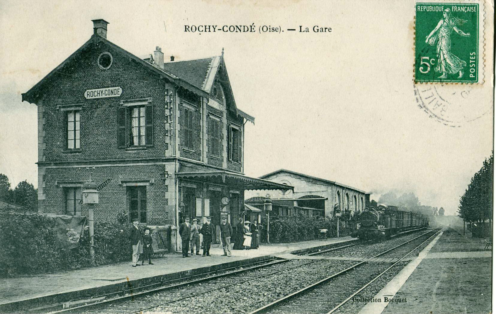 Carte postale ancienne éditée par Bocquet : ROCHY-CONDÉ - La Gare